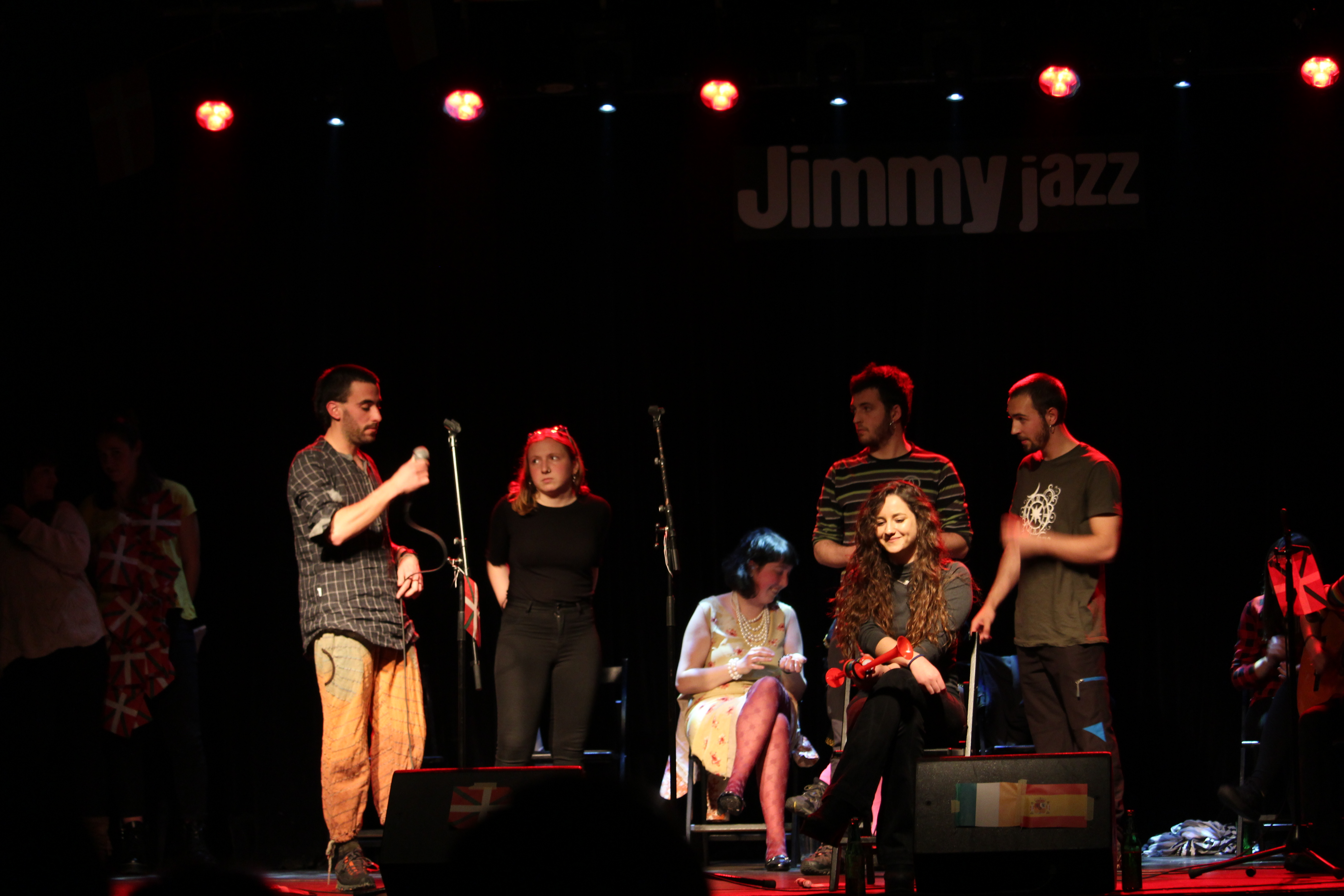 Bertso Saioa Egilea: Julen Bellan